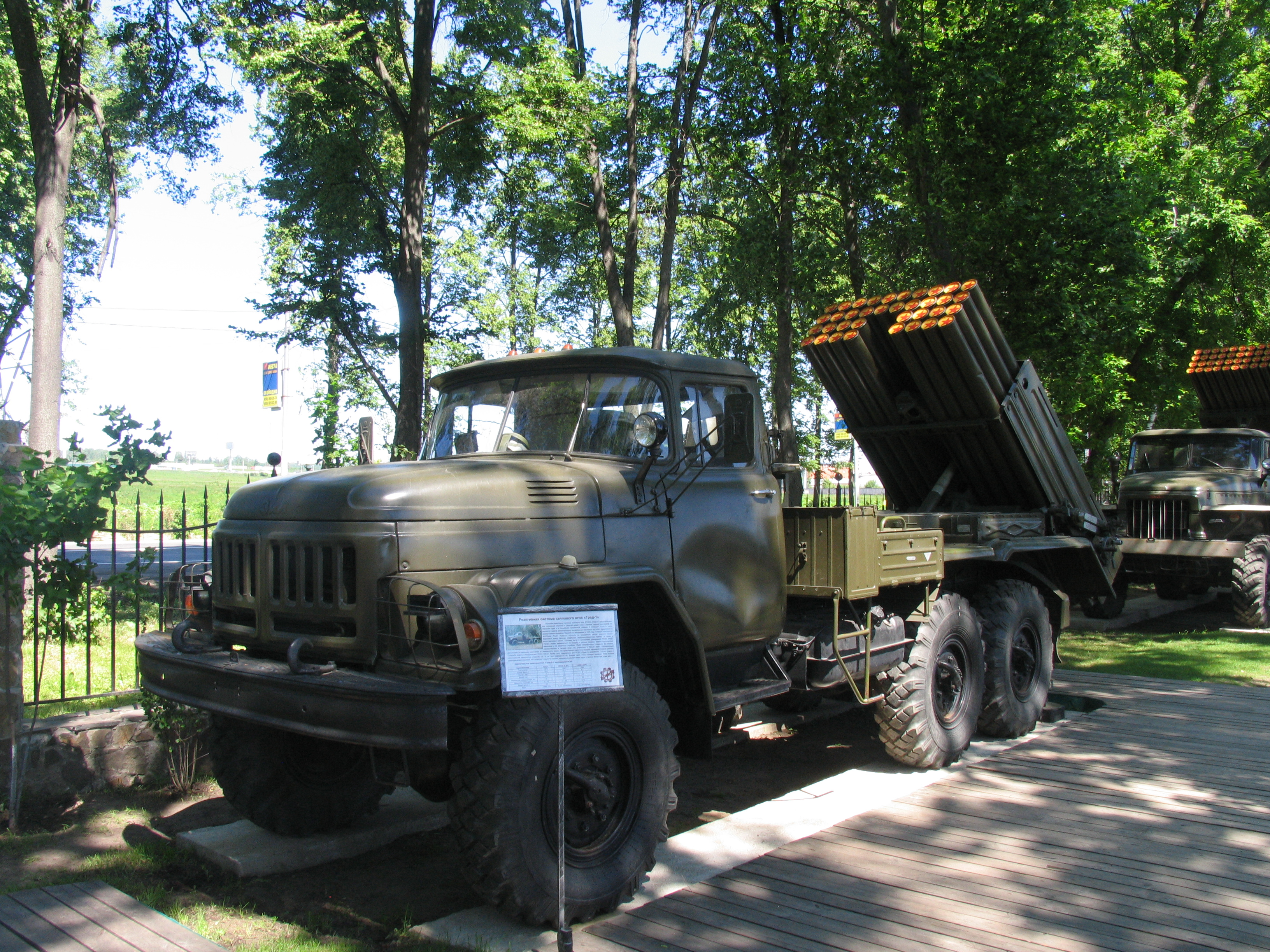 РСЗО 9П138 Град в Музее техники Задорожного.